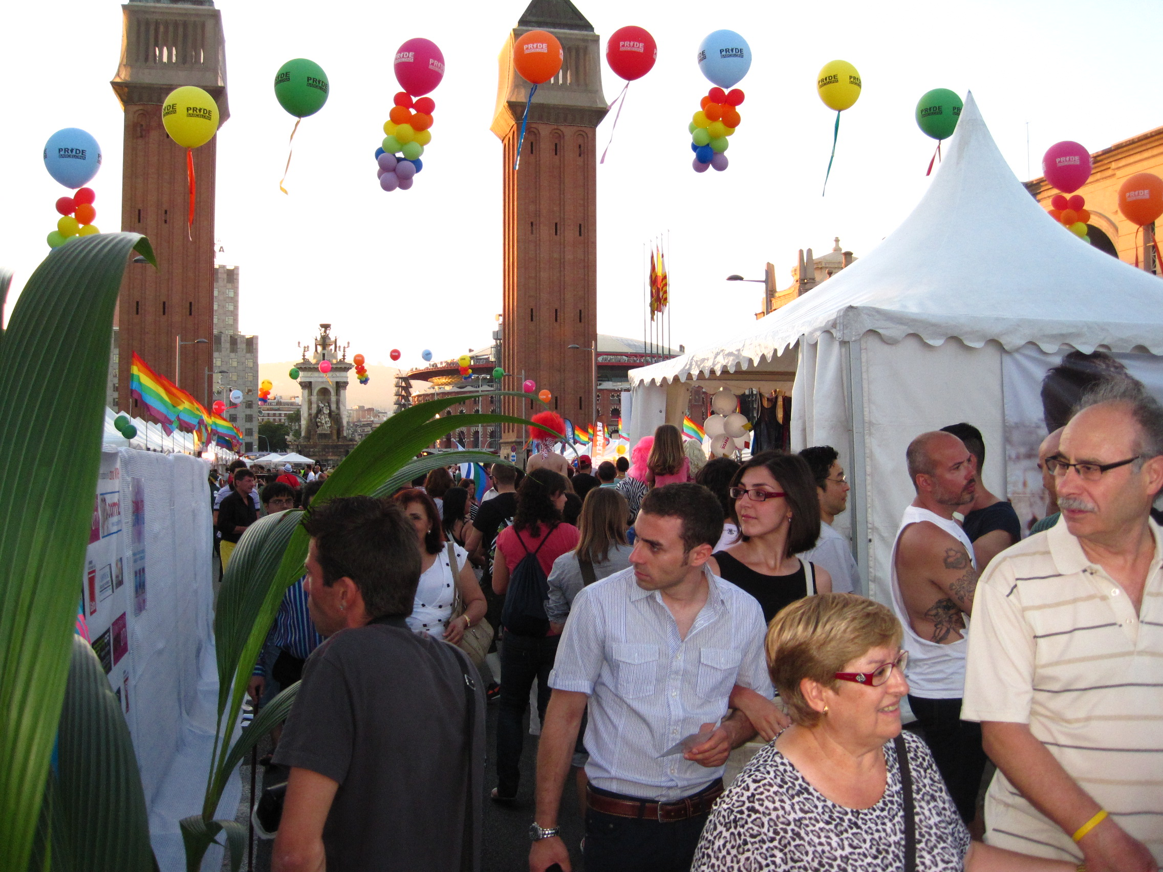 Gay pride, Barselona, 2011.